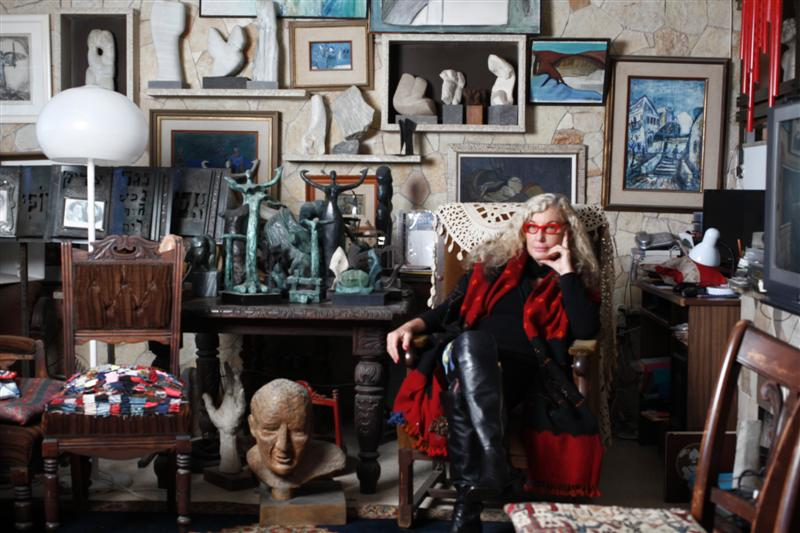 אביבה שמר בביתה 2015